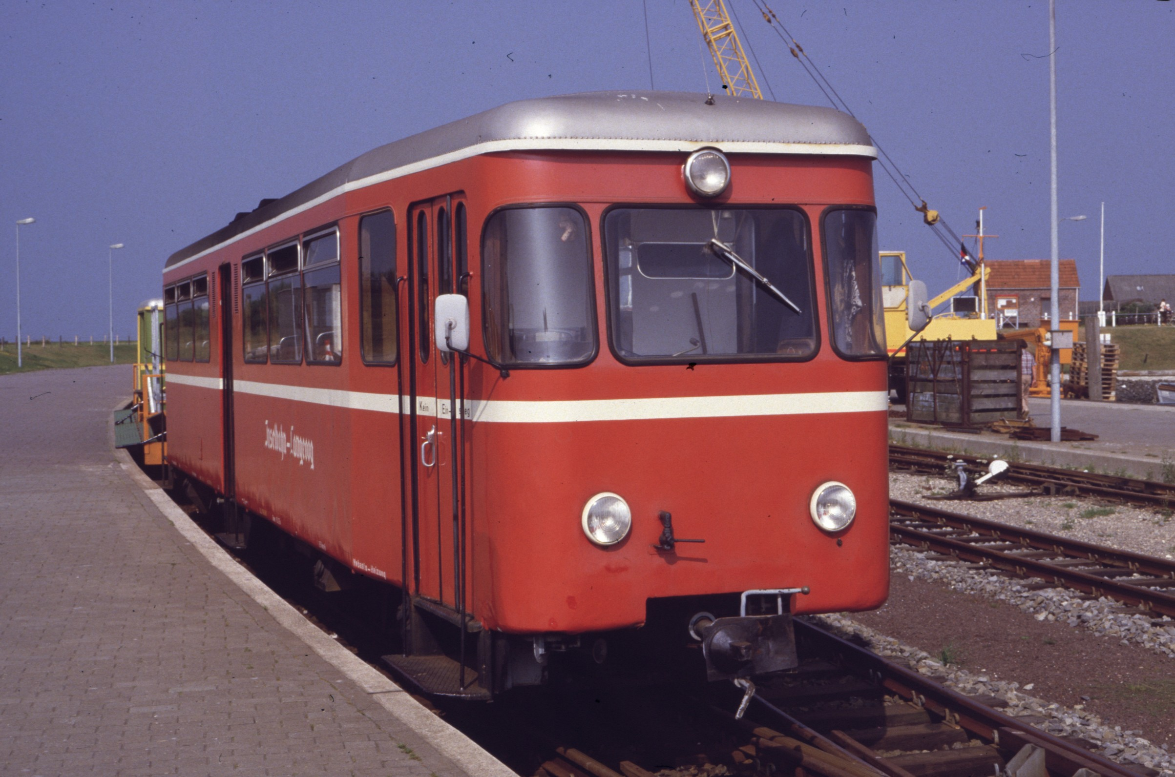 Langeoog Anleger am 28.08.1984 Talbot Triebwagen ex Kreis Altenaer Eisenbahn